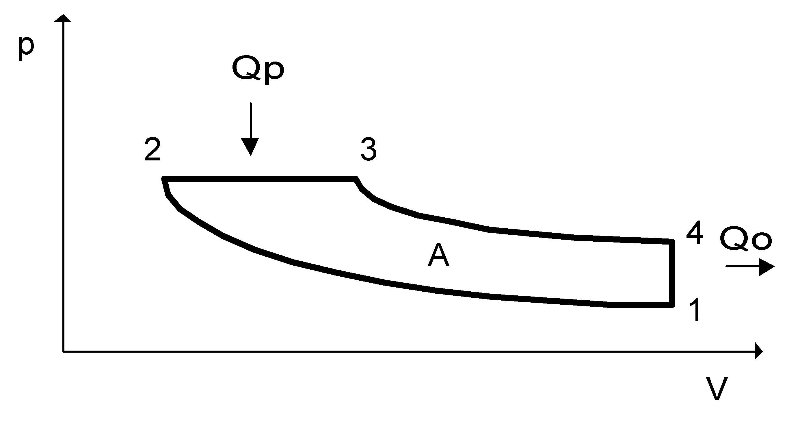 Diesel cycle in p-V diagram.